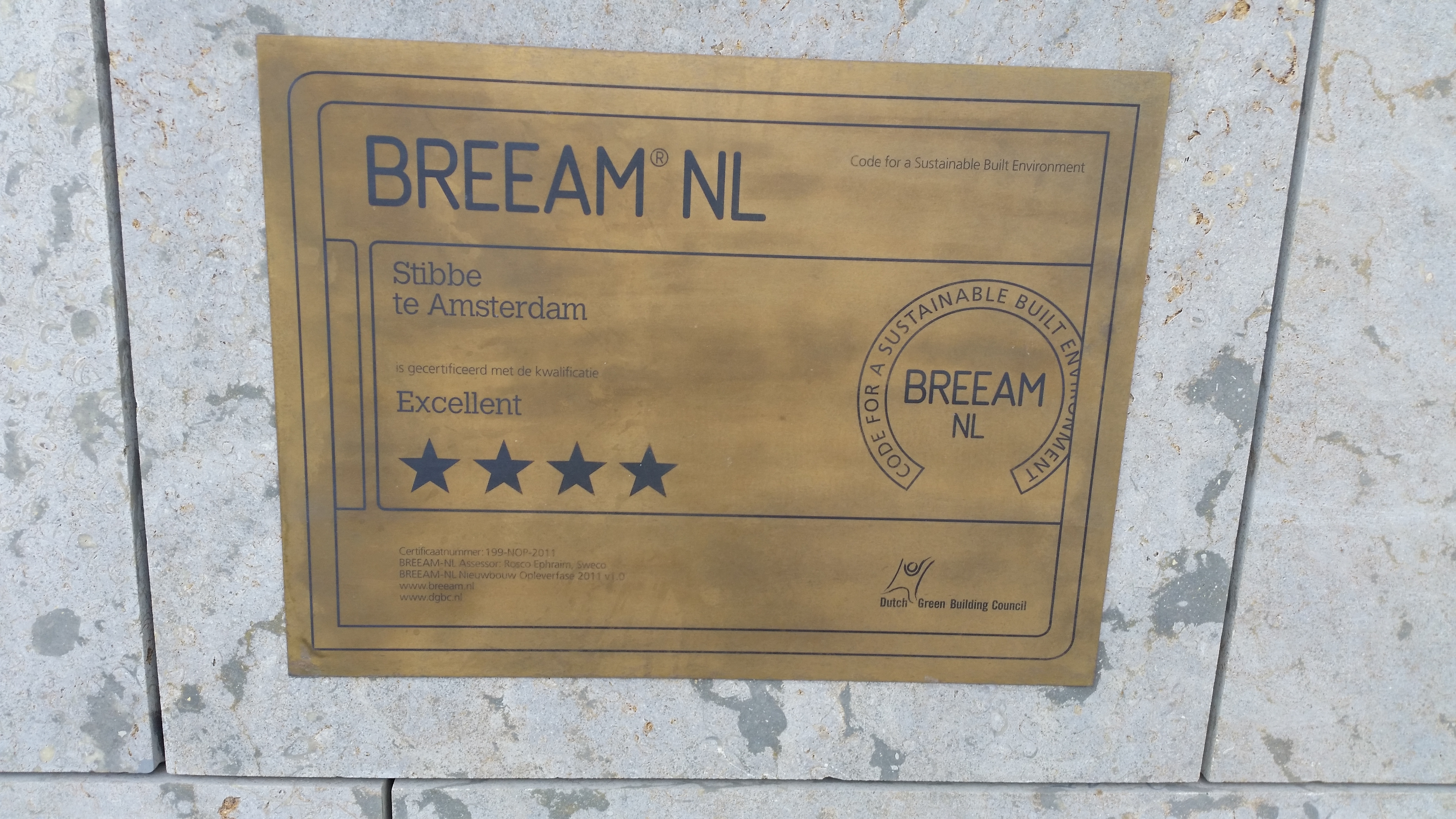 BREEAM-plaat aan gevel van Stibbe, Beethovenplein 10, Amsterdam-Zuid